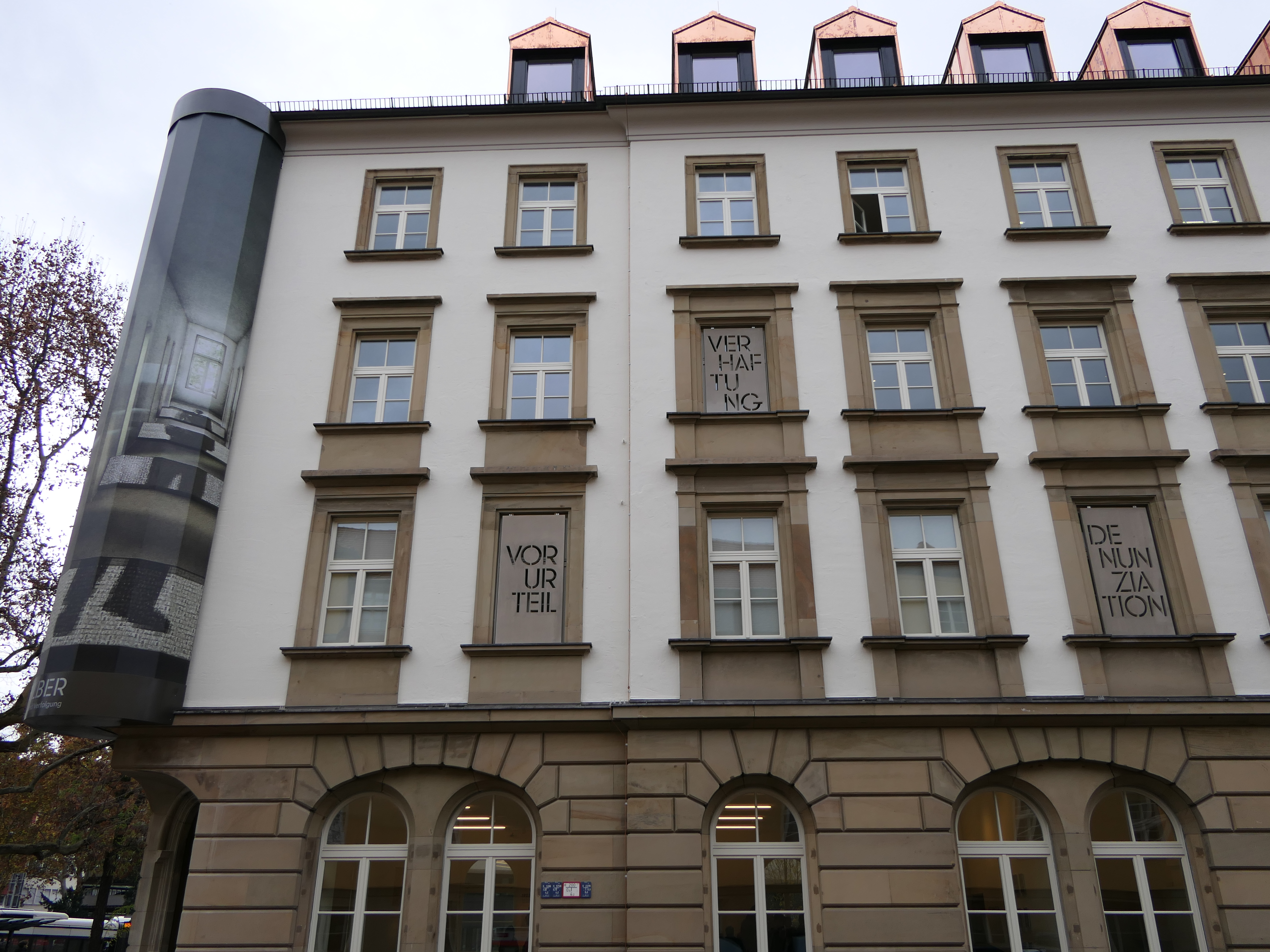 Das Hotel Silber nach seinem Umbau. Frontseite, linker Gebäudeteil.